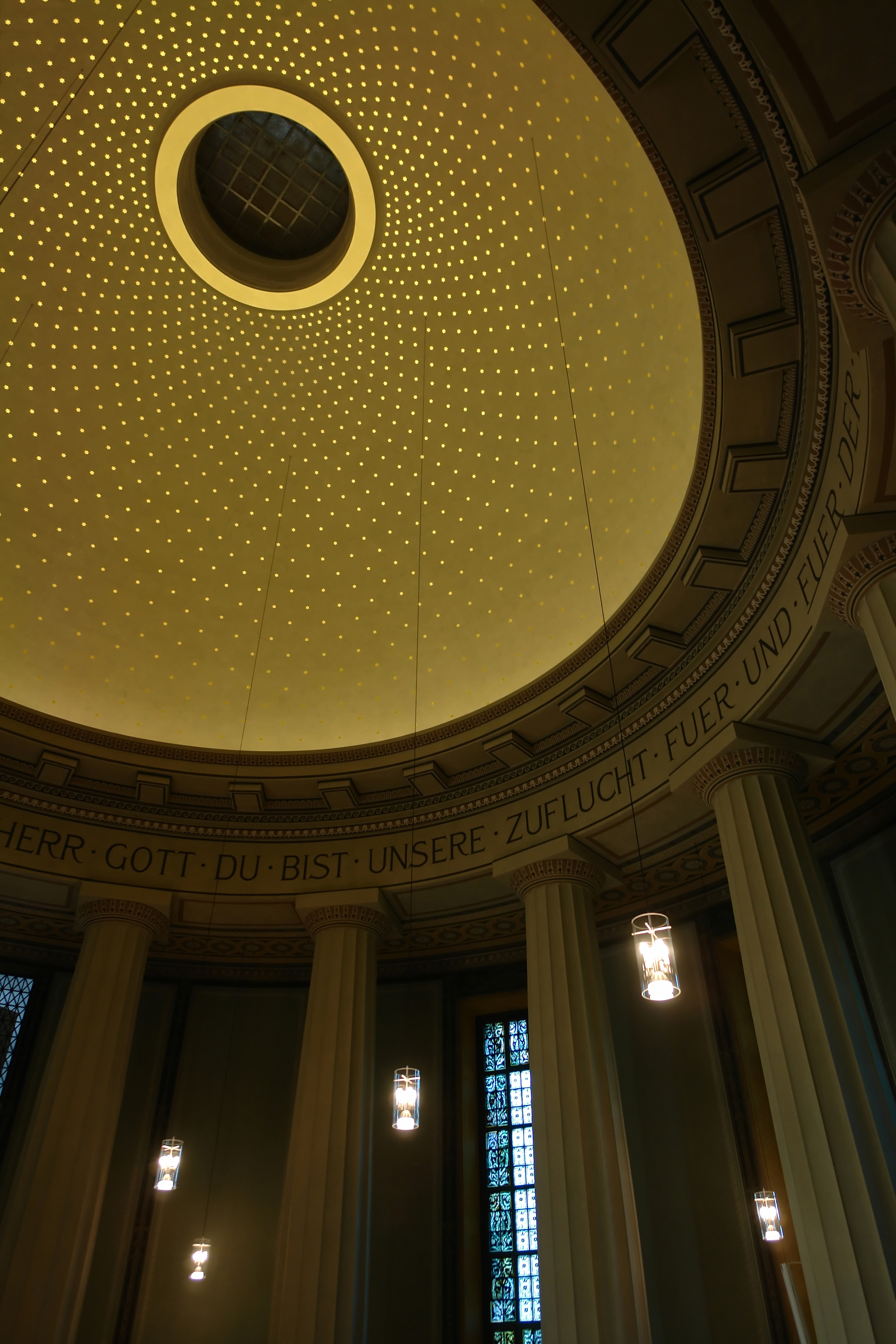 Kapelle auf dem Osterholzer Friedhof in Bremen.